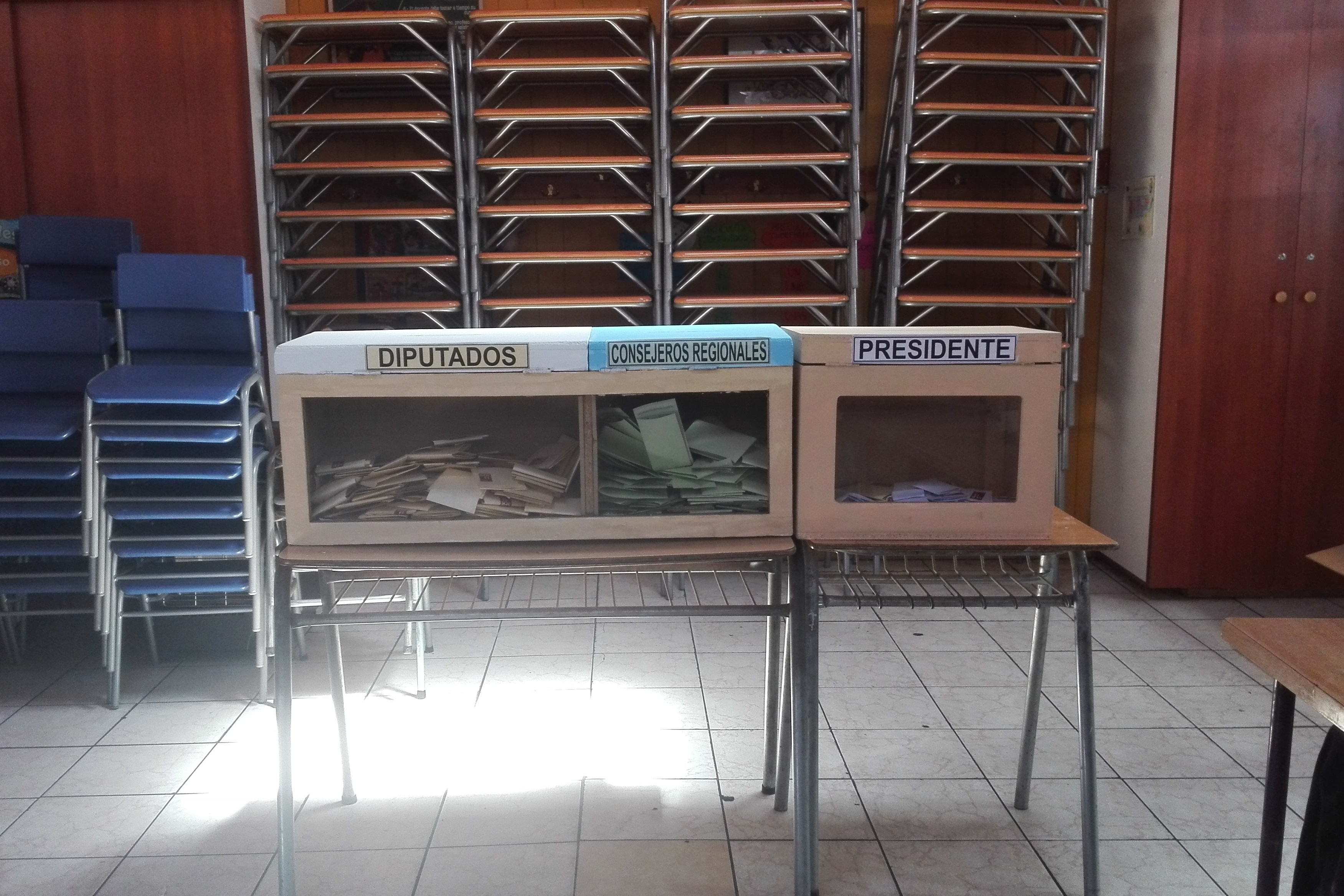 Urnas electorales con los votos del Distrito 15 (Cachapoal) para las elecciones presidencial, parlamentaria (diputados) y de consejeros regionales de Chile de 2017.